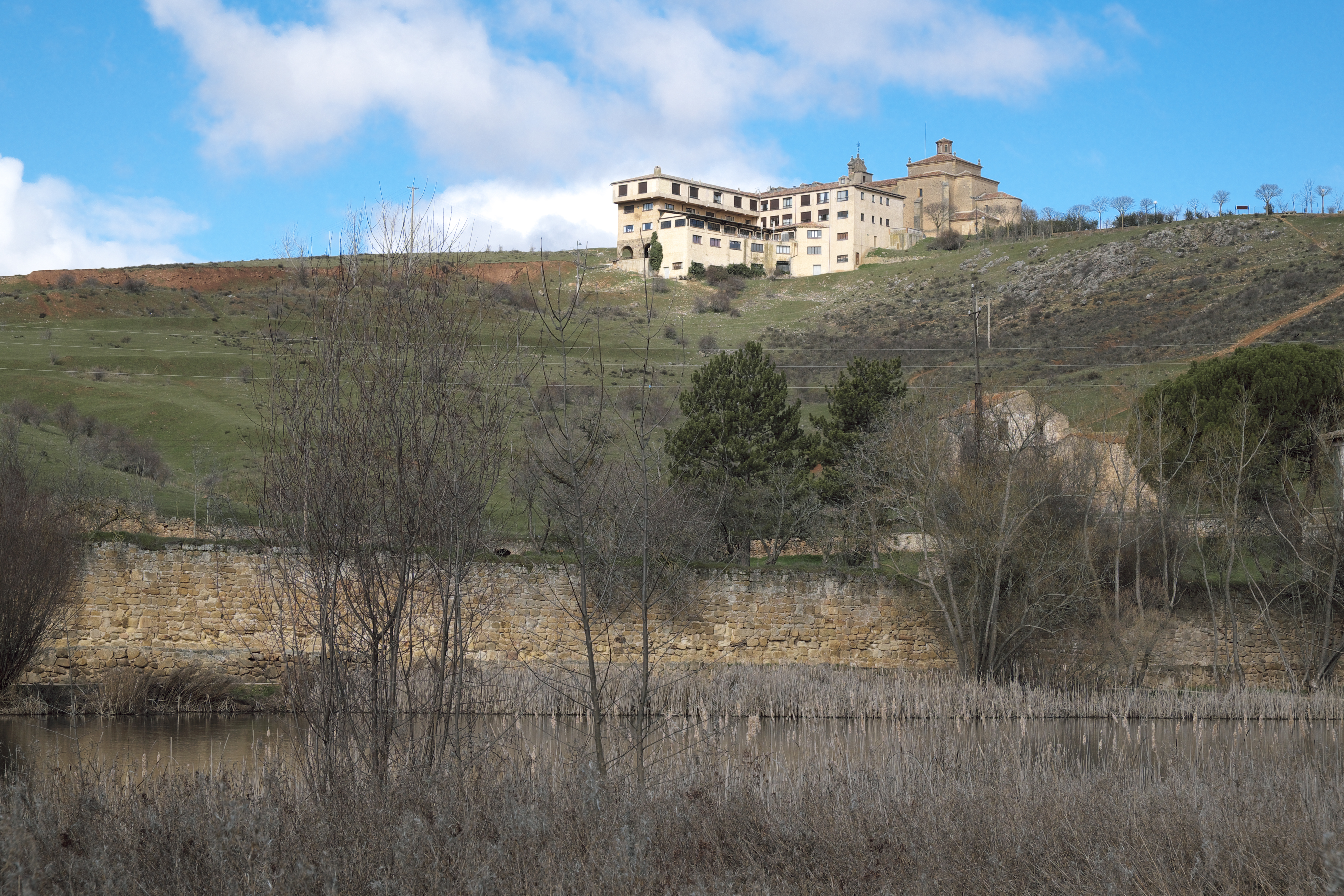 Ermita de Nuestra Señora del Mirón in Soria (Kastilien-León/Spanien)